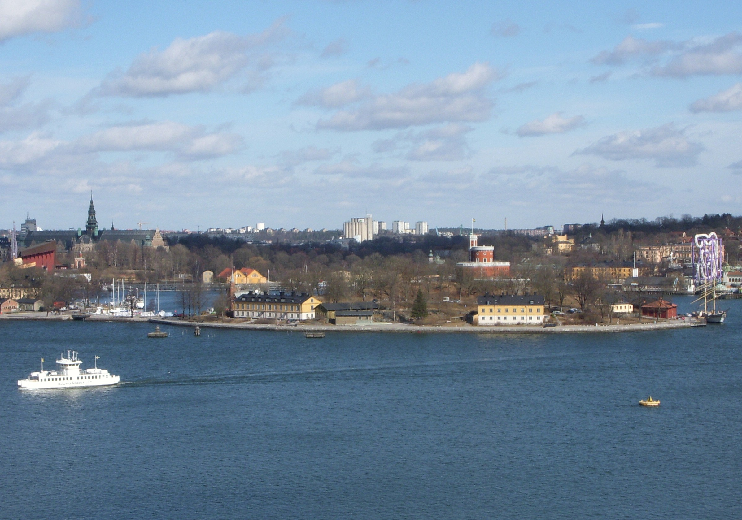 Kastellholmen, vy från Mosebacke